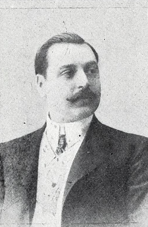 Narciso Méndez Bringa.